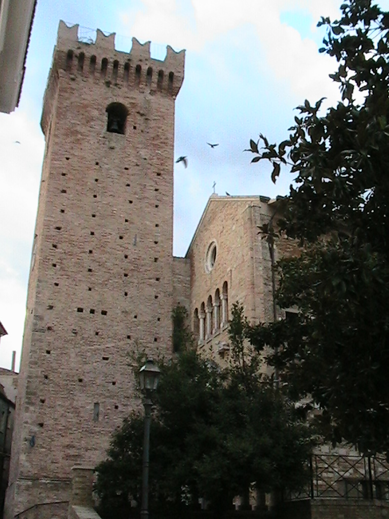 Mosciano Sant'Angelo - Torre